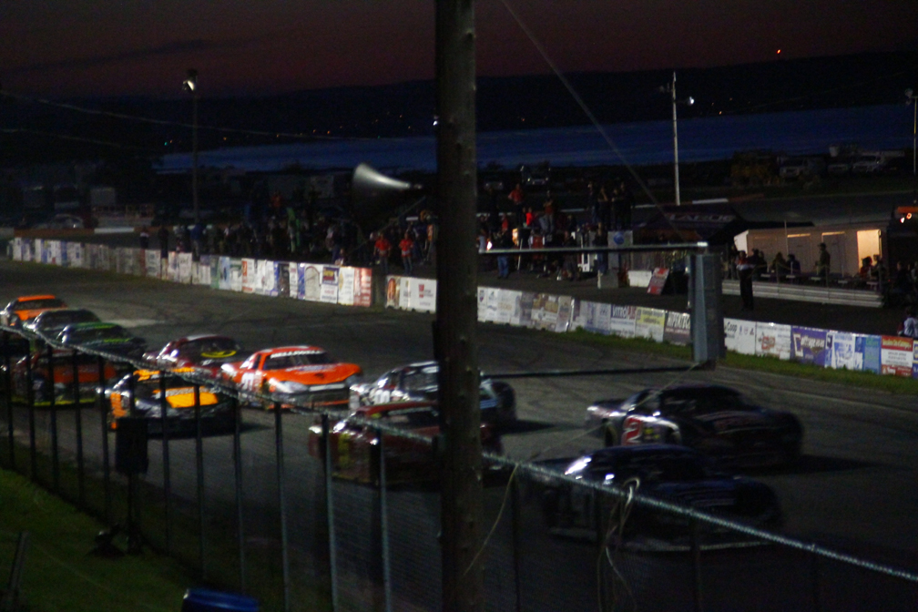 American Canadian Tour - Can-Am 200 - Circuit Riverside Speedway Ste-Croix - 24 août 2013